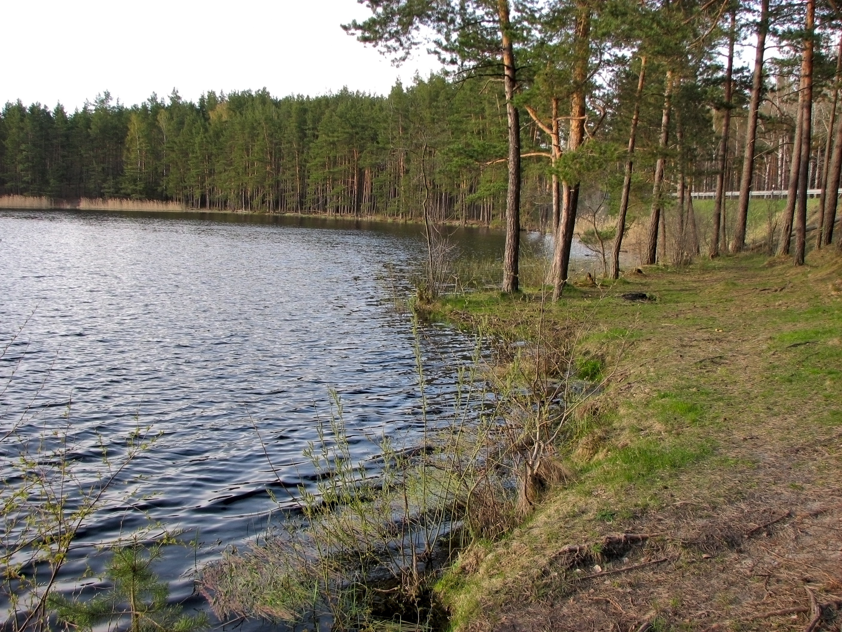 возле берега